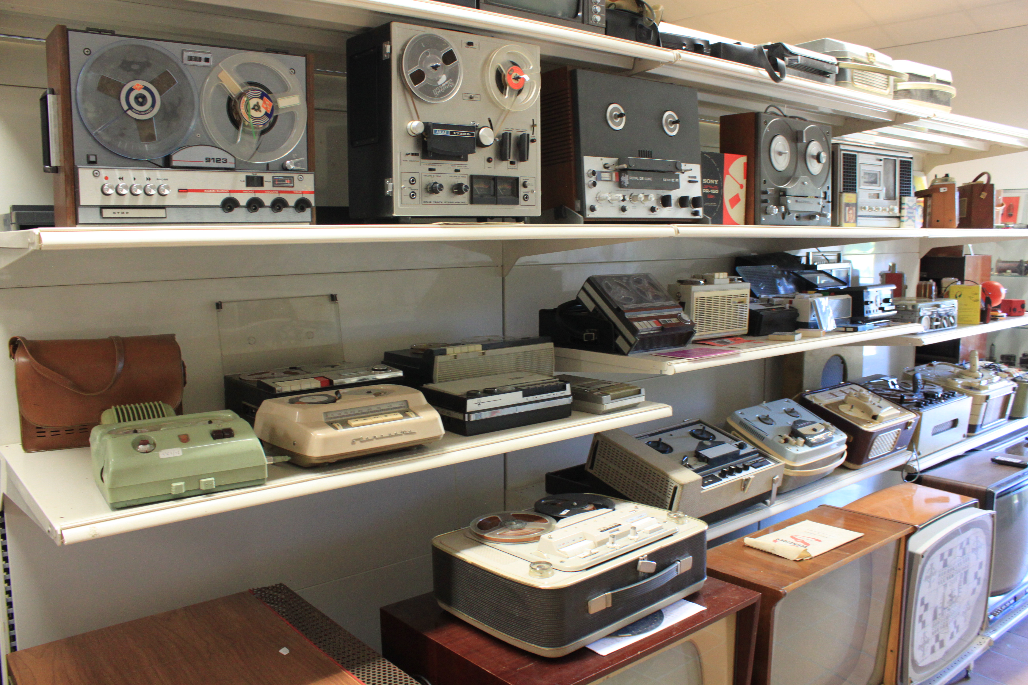 Musée_de_l'Electricité_de_Bourgogne, Saint-Apollinaire, Côte-d'Or, Bourgogne, France